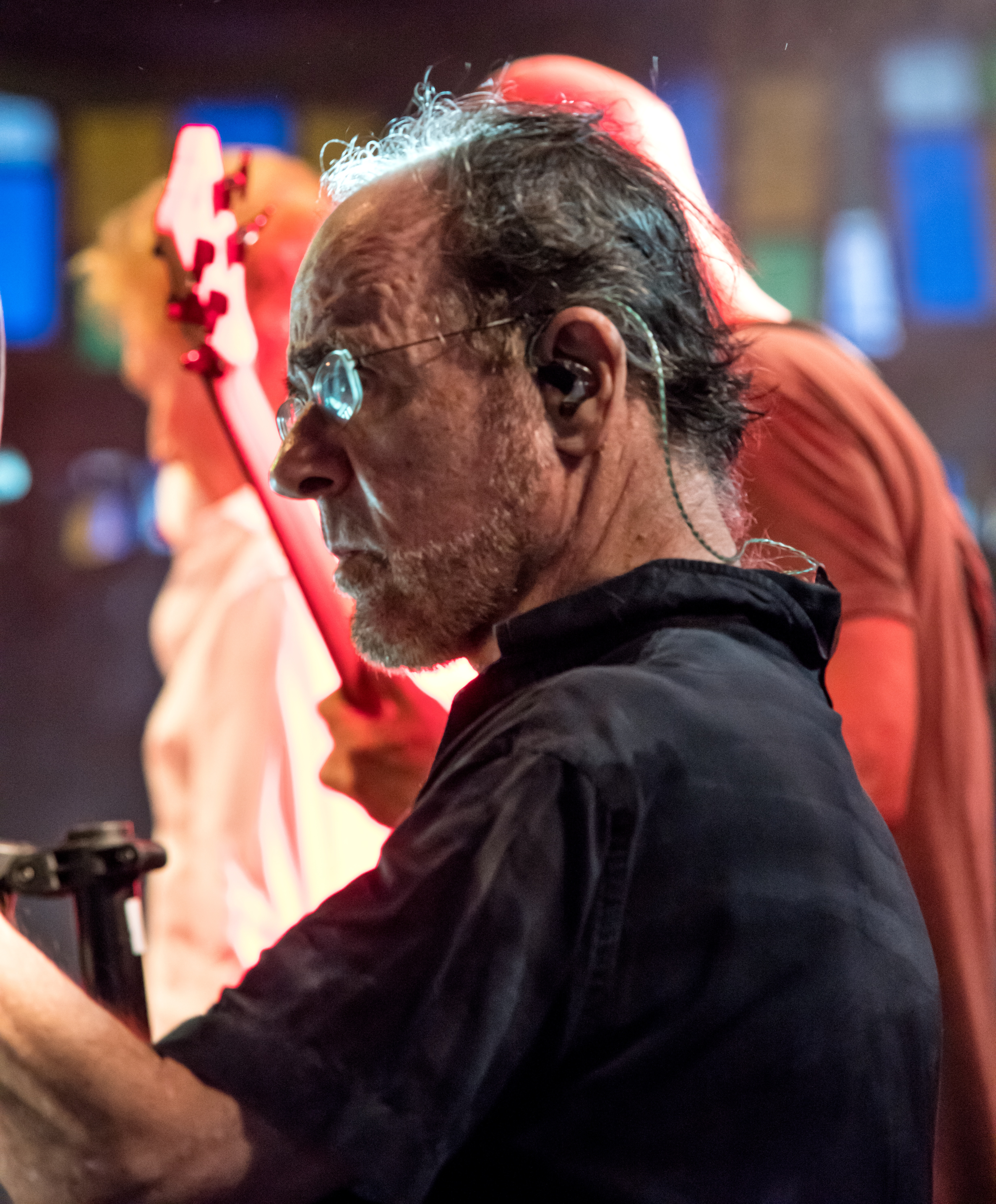 Bilder vom Zelt Musik Festival 2017 in Freiburg im Breisgau